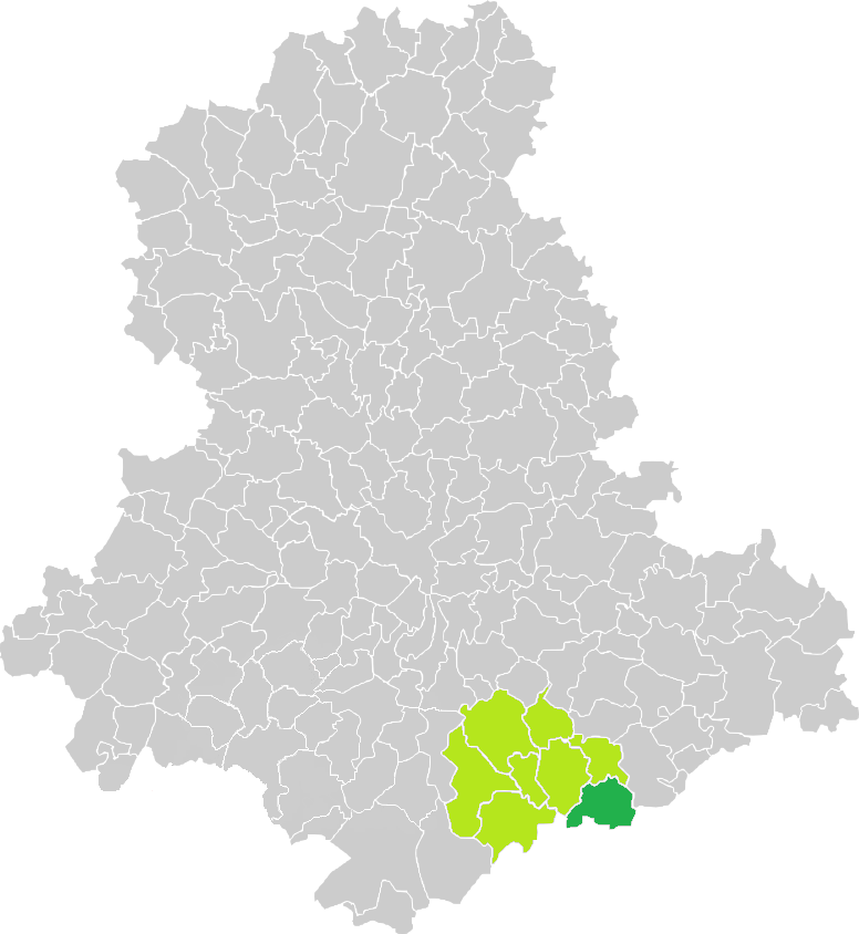 Carte de situation de la commune de La Porcherie (en vert foncé) dans le votre Canton (en vert clair) sur une carte des communes de la Haute-Vienne